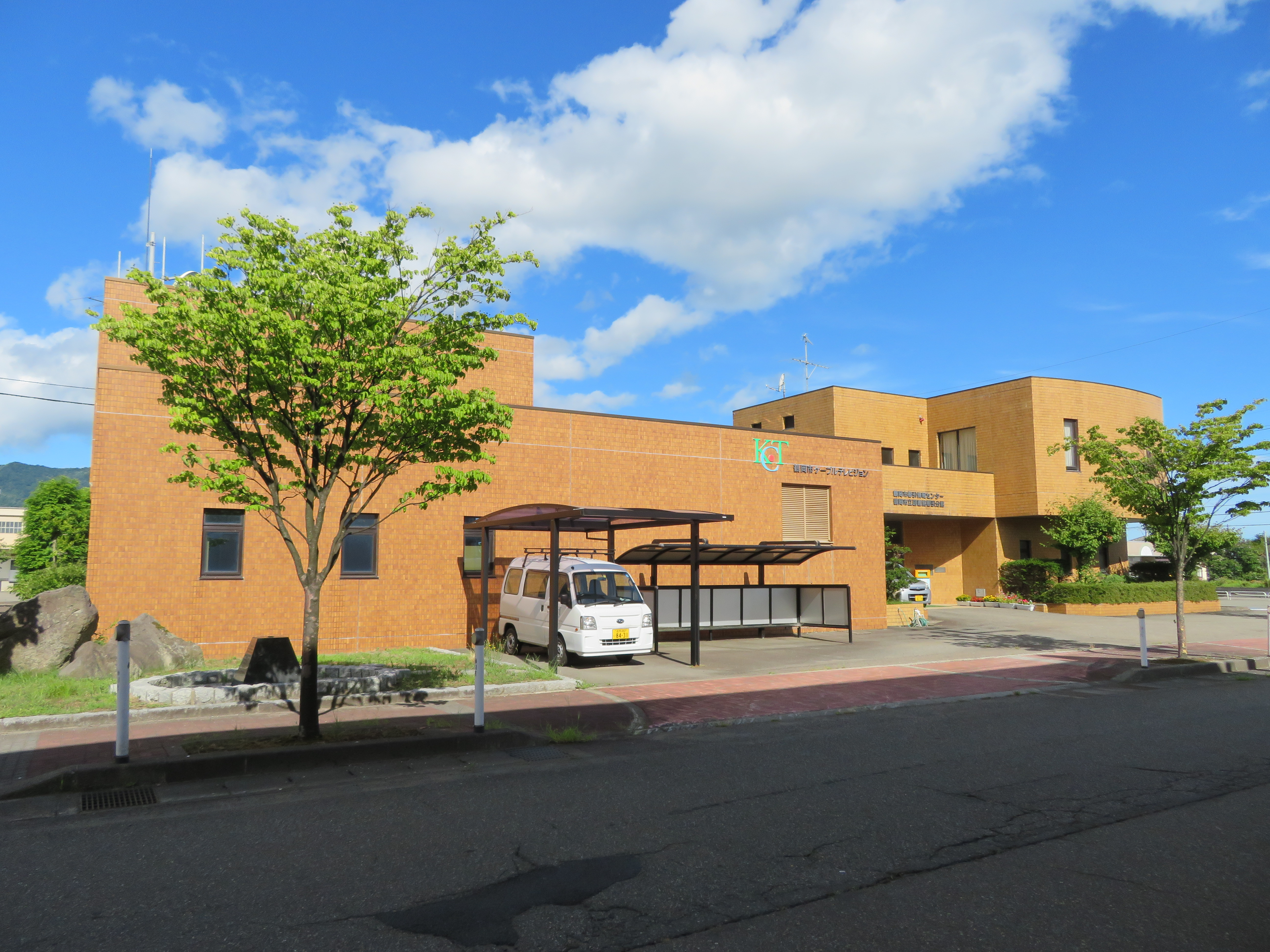 鶴岡市ケーブルテレビジョン局舎 Canon PowerShot SX720 HS